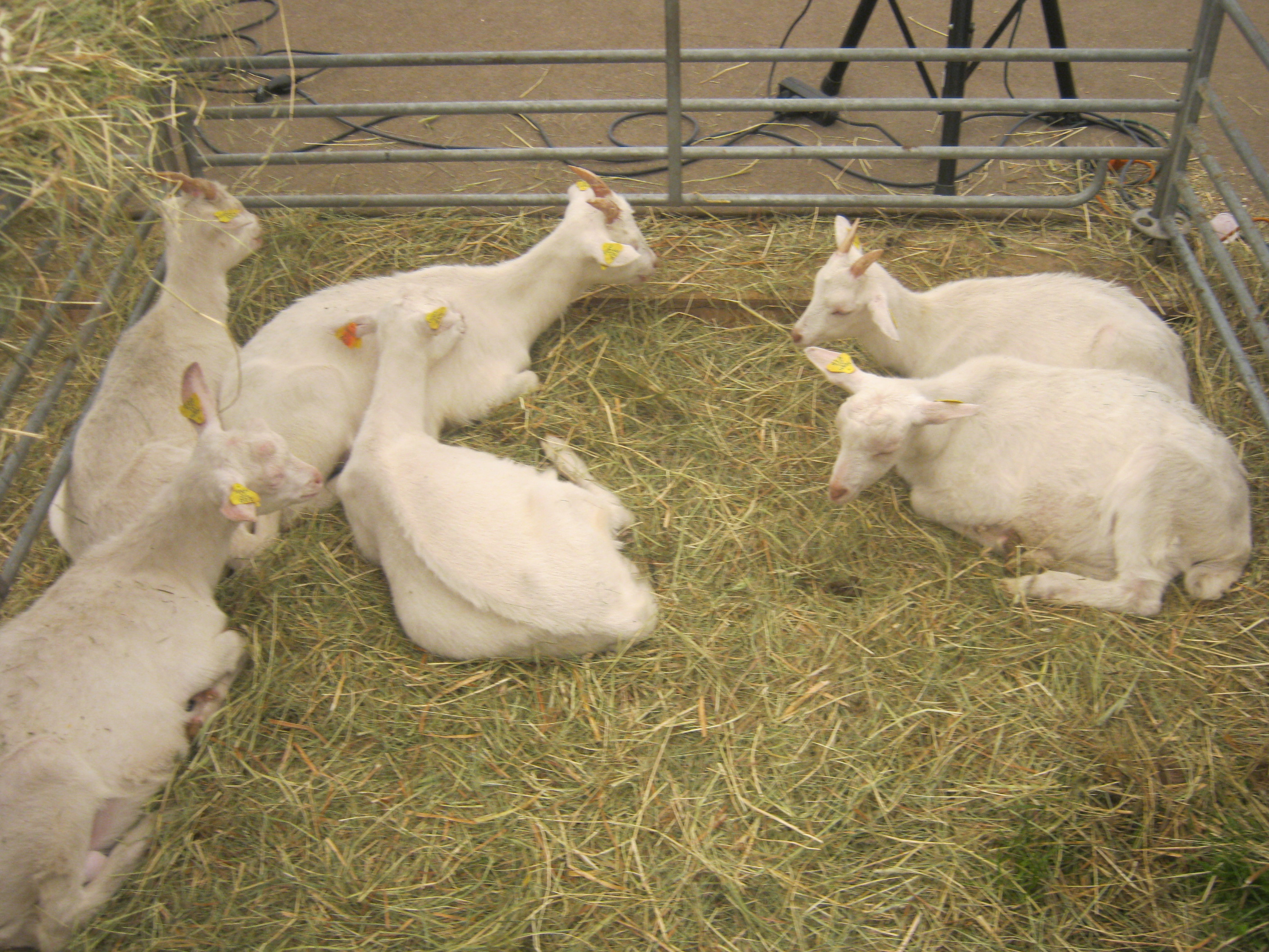 AgroBalt 2012